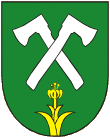 znak obce